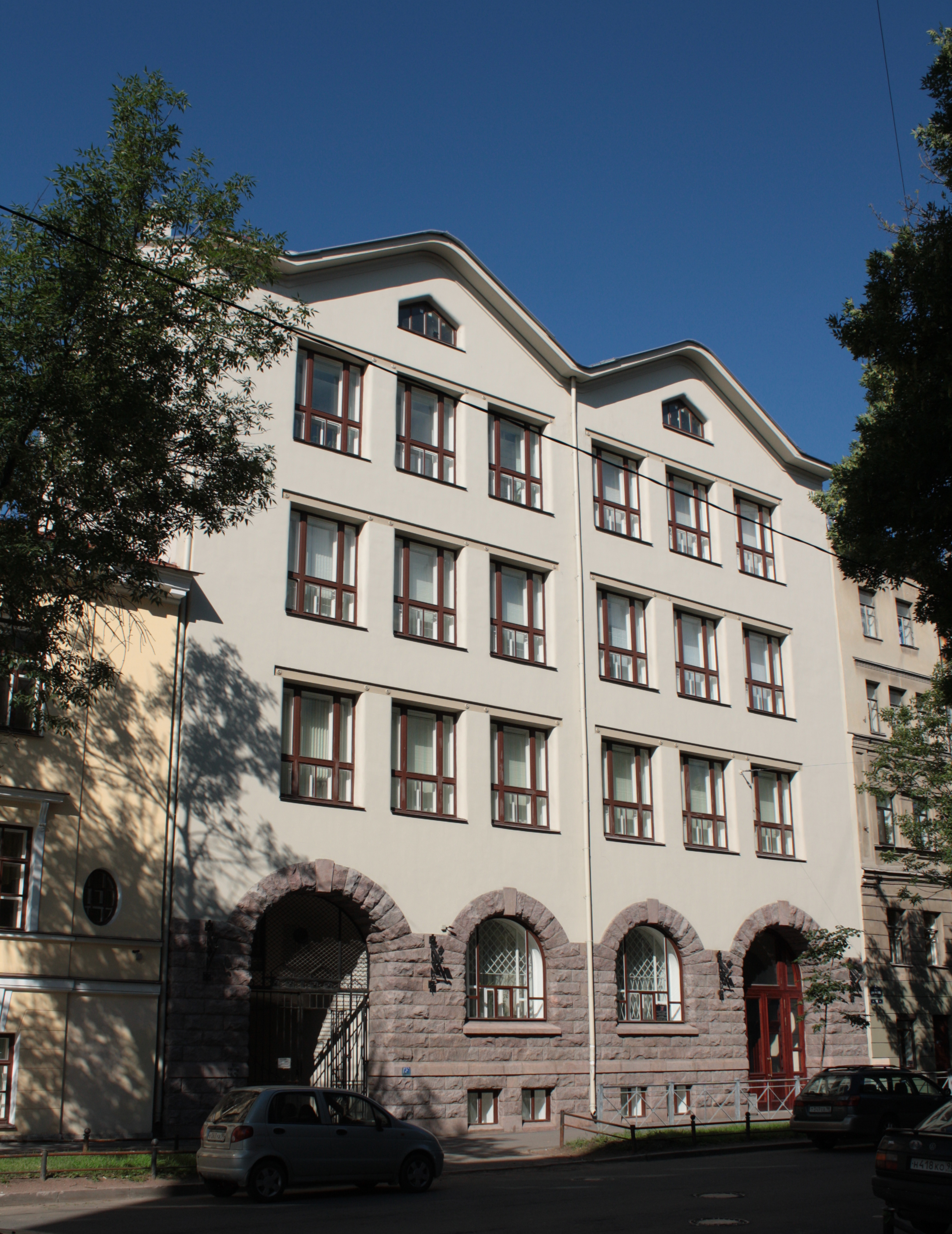 Санкт-Петербург. 5-я линия В. О., 16. Здание женской гимназии Э. П. Шаффе. 1907. Архитектор Карл Шмидт